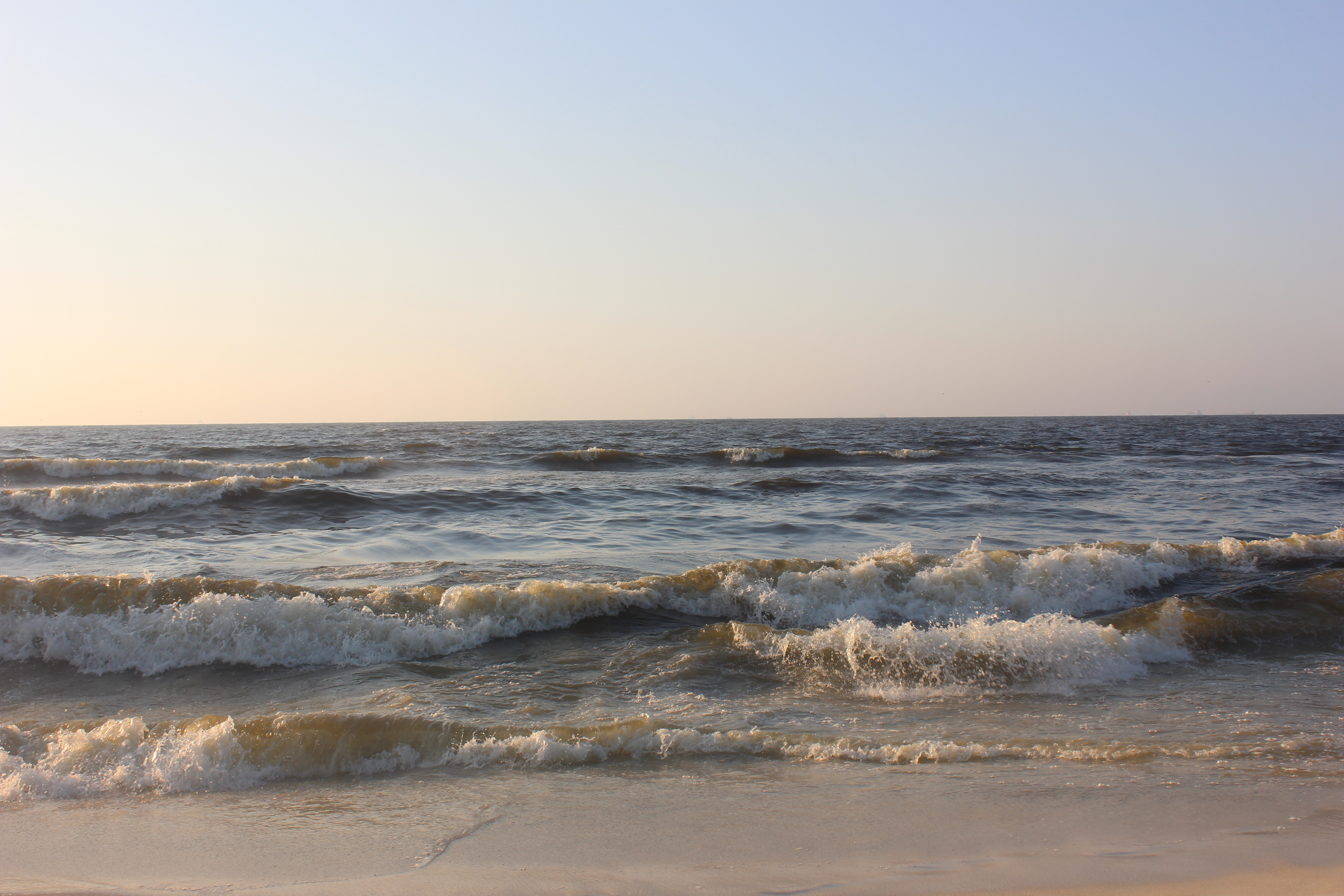 شاطىء الهانوفيل بالعجمي، مصر.